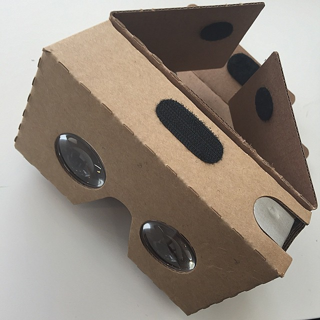 Картонные очки от гугла